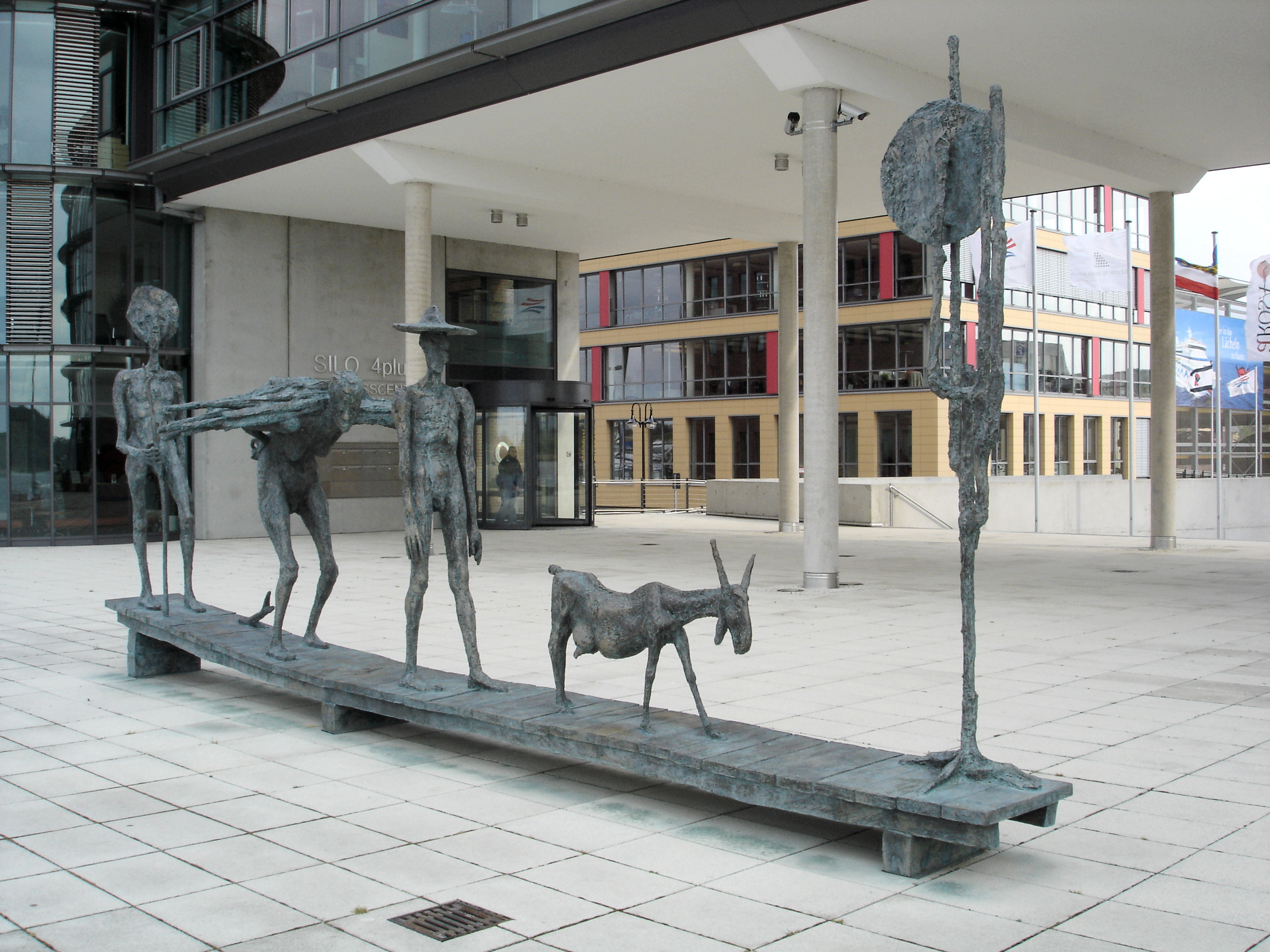 Figurengruppe "Reisende" von Jo Jastram in Rostock / Sculpture "Wayfarers" of Jo Jastram in Rostock